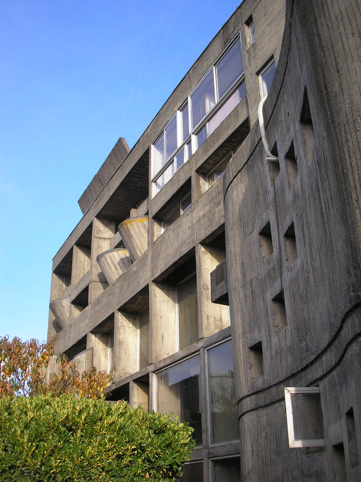 Edificio de la Cooperativa Eléctrica de Chillán, Copelec. Fachada hacia el patio trasero, donde es posible ver que la composición formada por las perforaciones es distinta que hacia la calle Maipón, dada su distinta orientación respecto al sol. This is a photo of a national monument in Chile: 2032